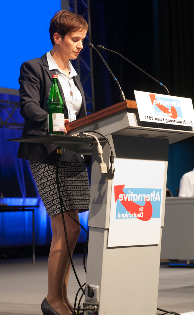 a.o. Bundesparteitag der Alternative für Deutschland, 4. Juli 2015 in Essen, Gruga Halle a.o. Bundesparteitag der Alternative für Deutschland am 4./5. Juli 2015 in Essen, Gruga Halle